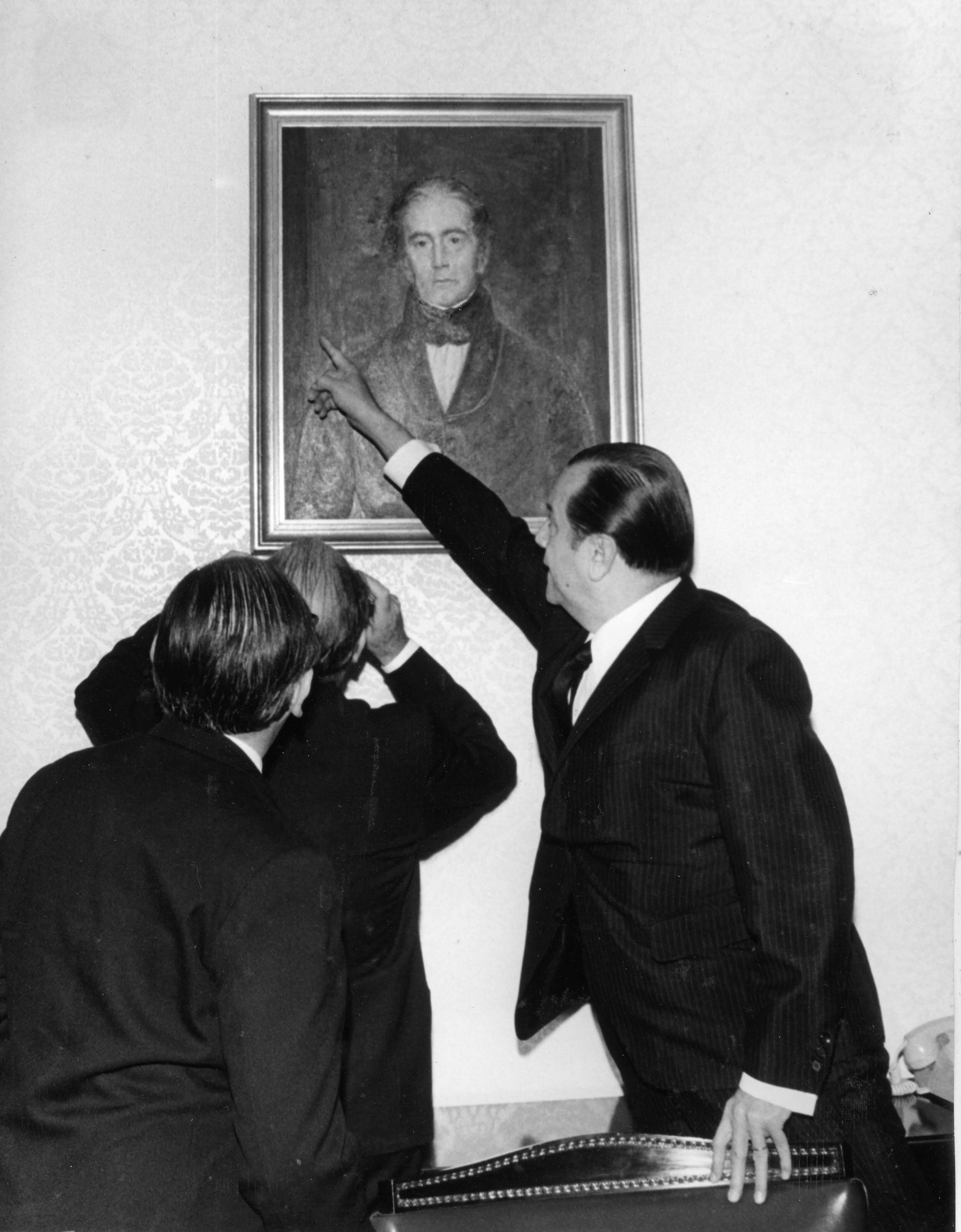 El presidente Rafael Caldera colocando un óleo de Andrés Bello en La Casona, área del Despacho presidencial.